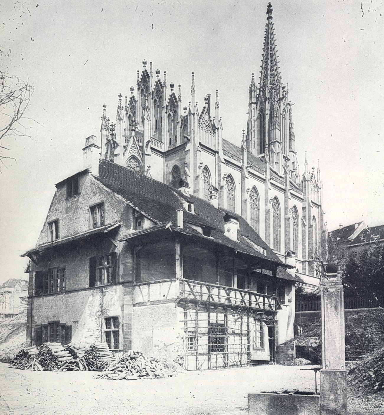 Die Elisabethenkirche in Basel, davor ein Gebäude des ehemaligen Steinenklosters.